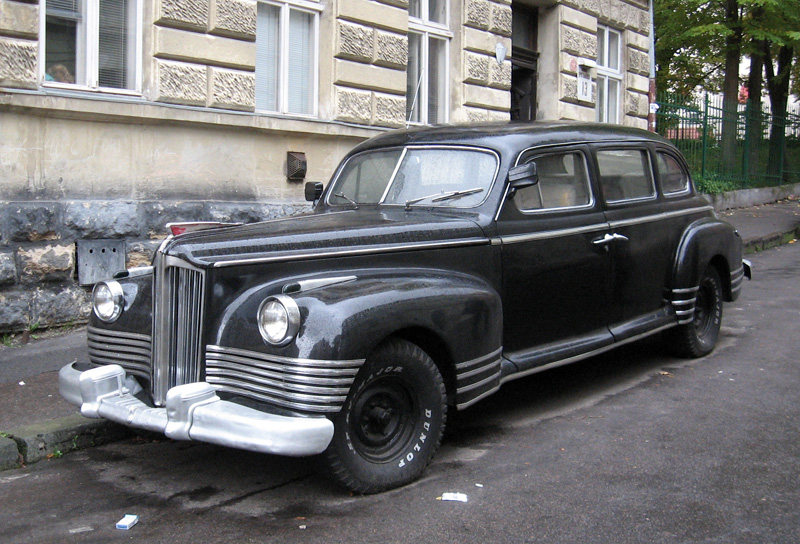 ZiS car in Lviv, Ukraine ЗіС-110 у Львові, Україна